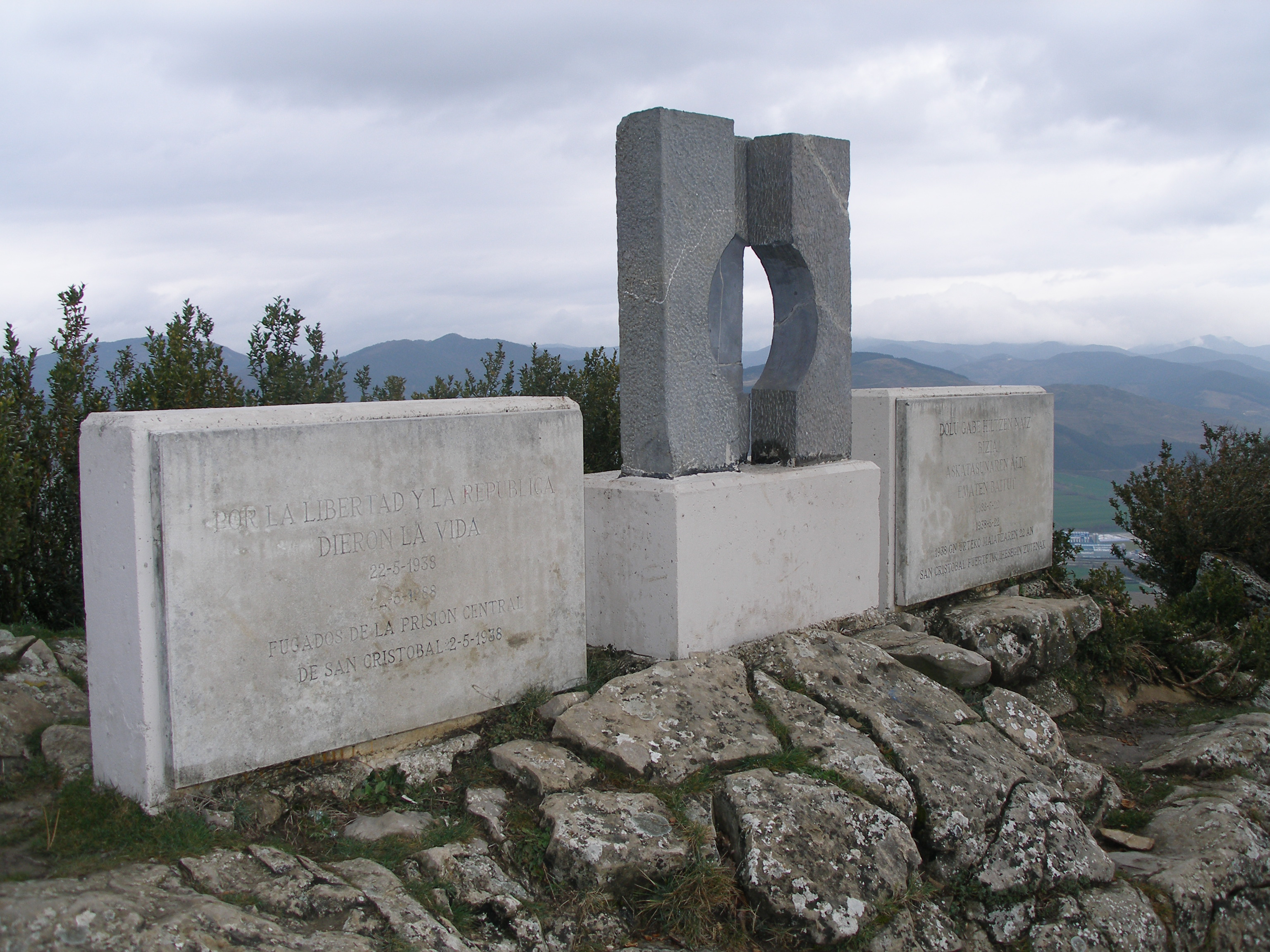 Monumento en la cara sur del Monte Ezkaba en homneje a los fugados del fuerte San Cristóbal.